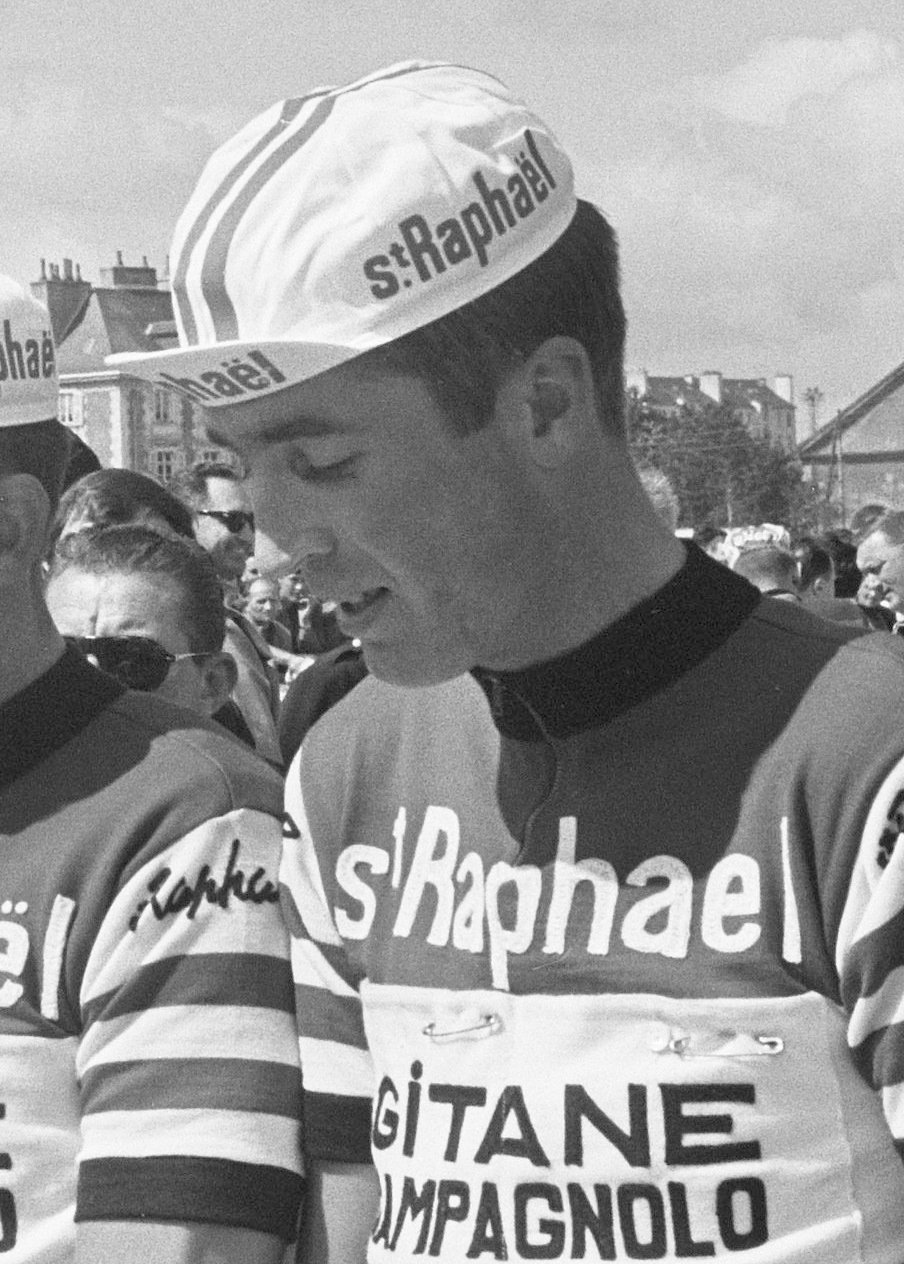 Nationaal Archief Beschrijving: De St. Raphael-Gitanes ploeg. vlnr: Ab Geldermans Datum: 24 juni 1964 Bestanddeelnummer 916-5778 Vervaardiger: Anefo / Harry Pot (1929–1996) DescriptionDutch photographer and cinematographerDate of birth/death 1929 1996Work location Amsterdam, BentveldAuthority control : Q27877051 VIAF: 284191334 ISNI: 0000 0003 9050 874X Koninklijke: 073478326 creator QS:P170,Q27877051 URL: Voor meer informatie over het Nationaal Archief: Voor meer foto's uit deze en andere collecties, bezoek onze Beeldbank:, U kunt ons helpen onze kennis van de fotocollecties te verrijken door tags en commentaren toe te voegen. Herkent u mensen of locaties of heeft u een bijzonder verhaal te vertellen bij één van de foto's, laat dan een reactie achter (als u ingelogd bent bij Flickr) of stuur een mailtje naar